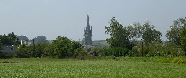 Vue sur le clocher de Goulven, dans le Finistère (France)